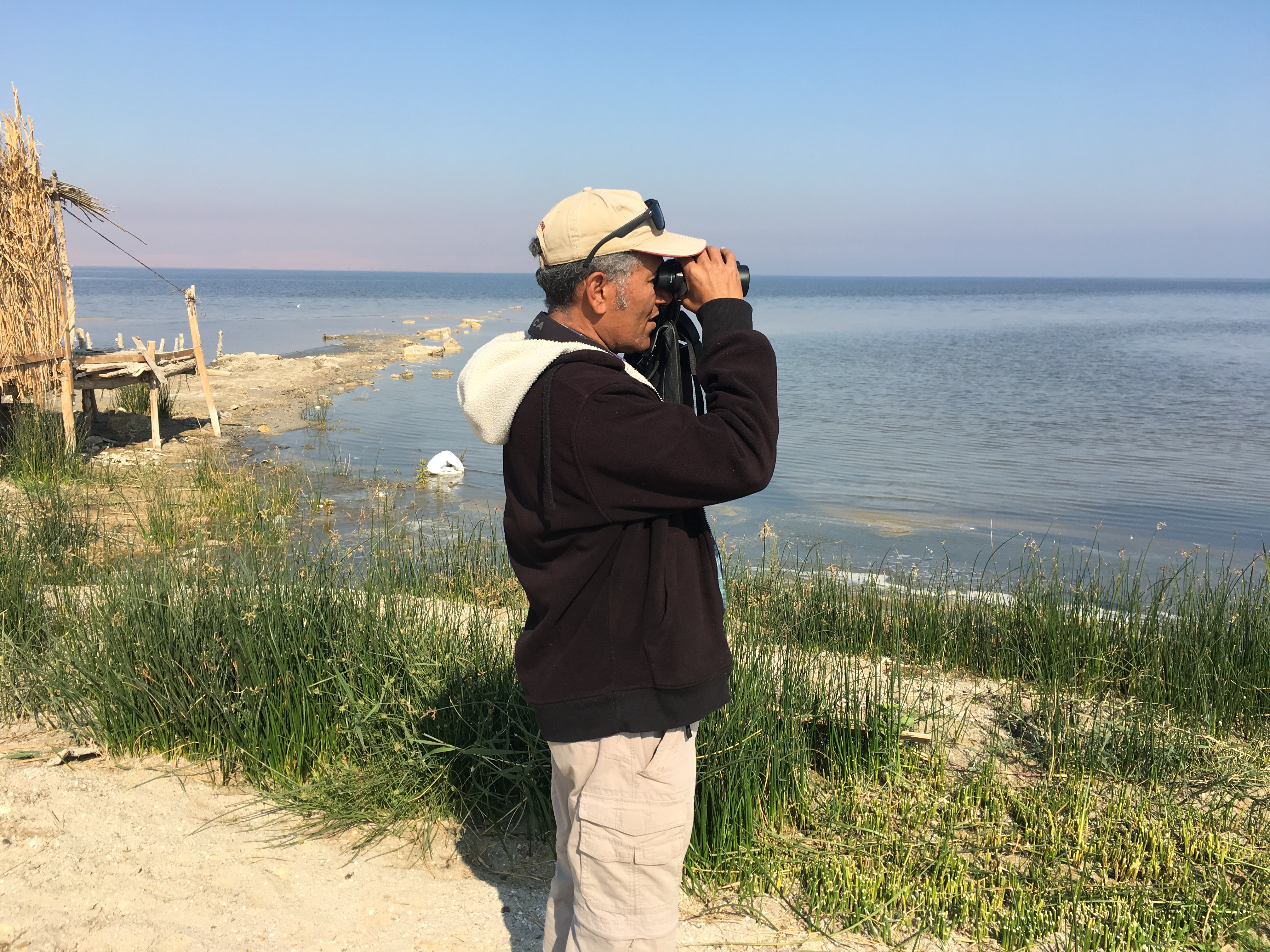 شريف بهاء الدين اثناء مراقبة الطيور في محمية قارون